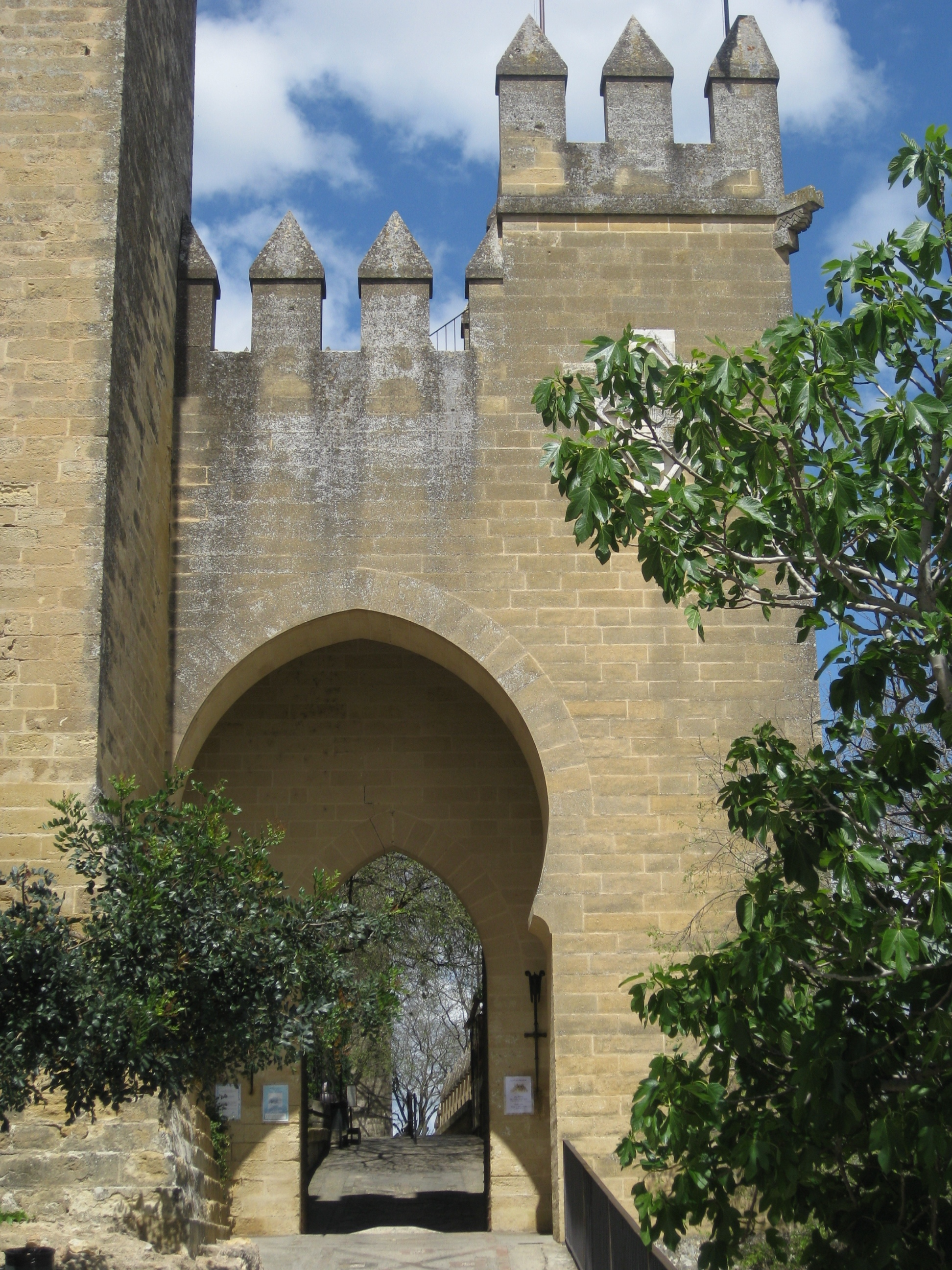 Almodovar abr 12